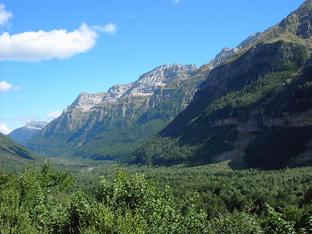 La Man Pazina, la vertiente norte de la Sierra de las Zucas hacia el Valle de Pineta